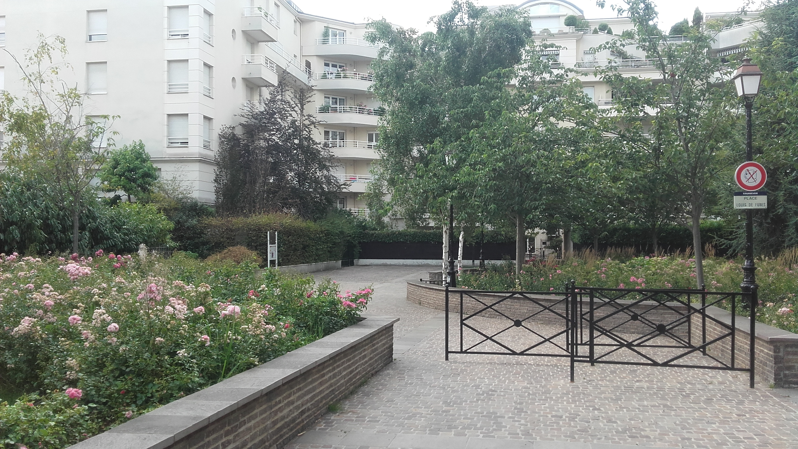 Place Louis de Funès, 92400 Courbevoie, France